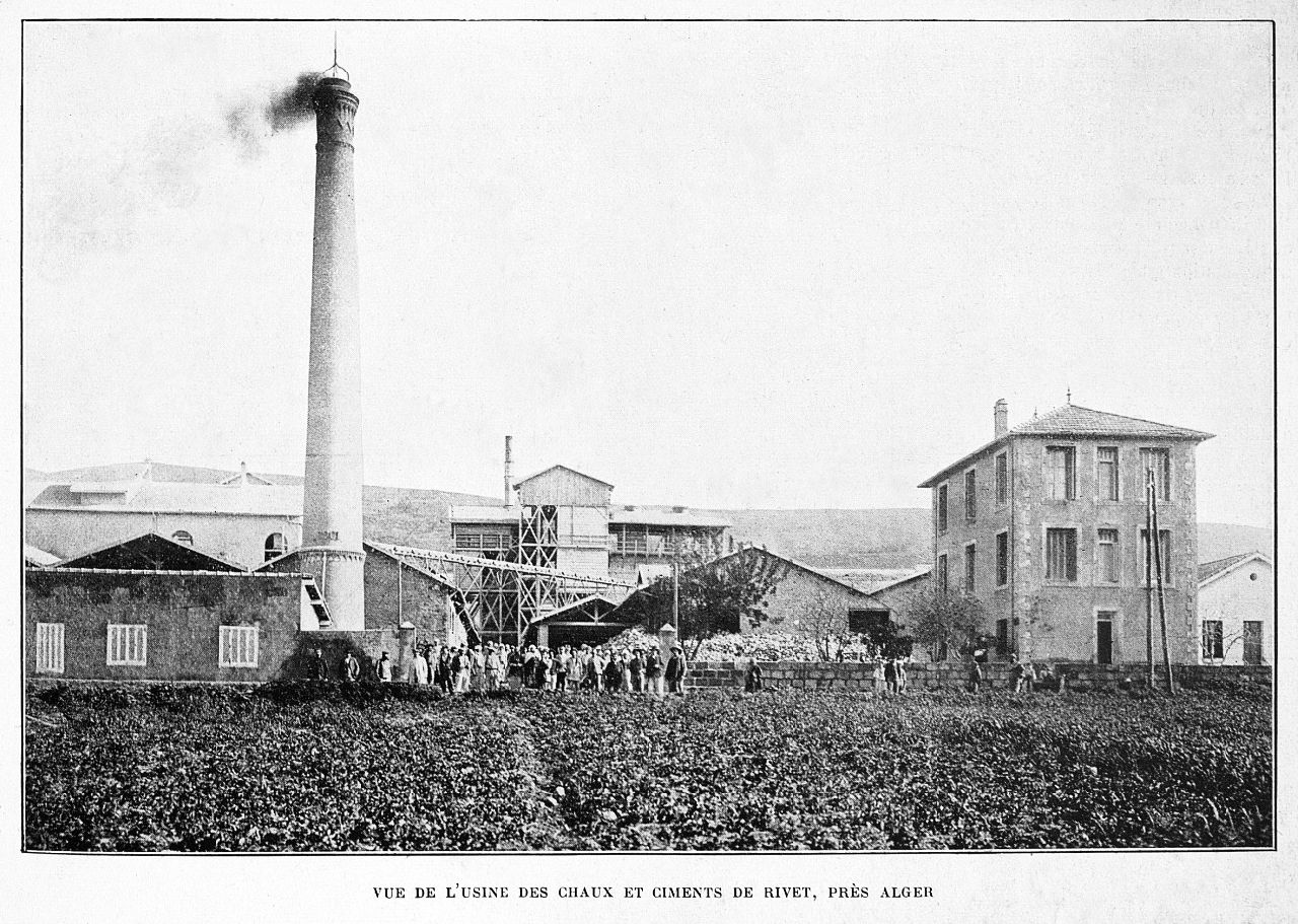 Usine des chaux et ciments de Rivet, près d'Alger, 1911.